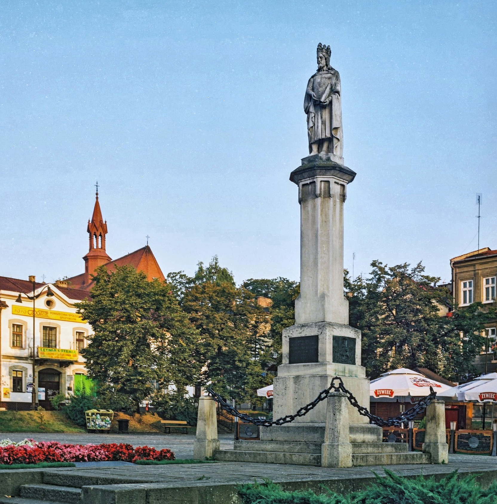 Bocheński rynek